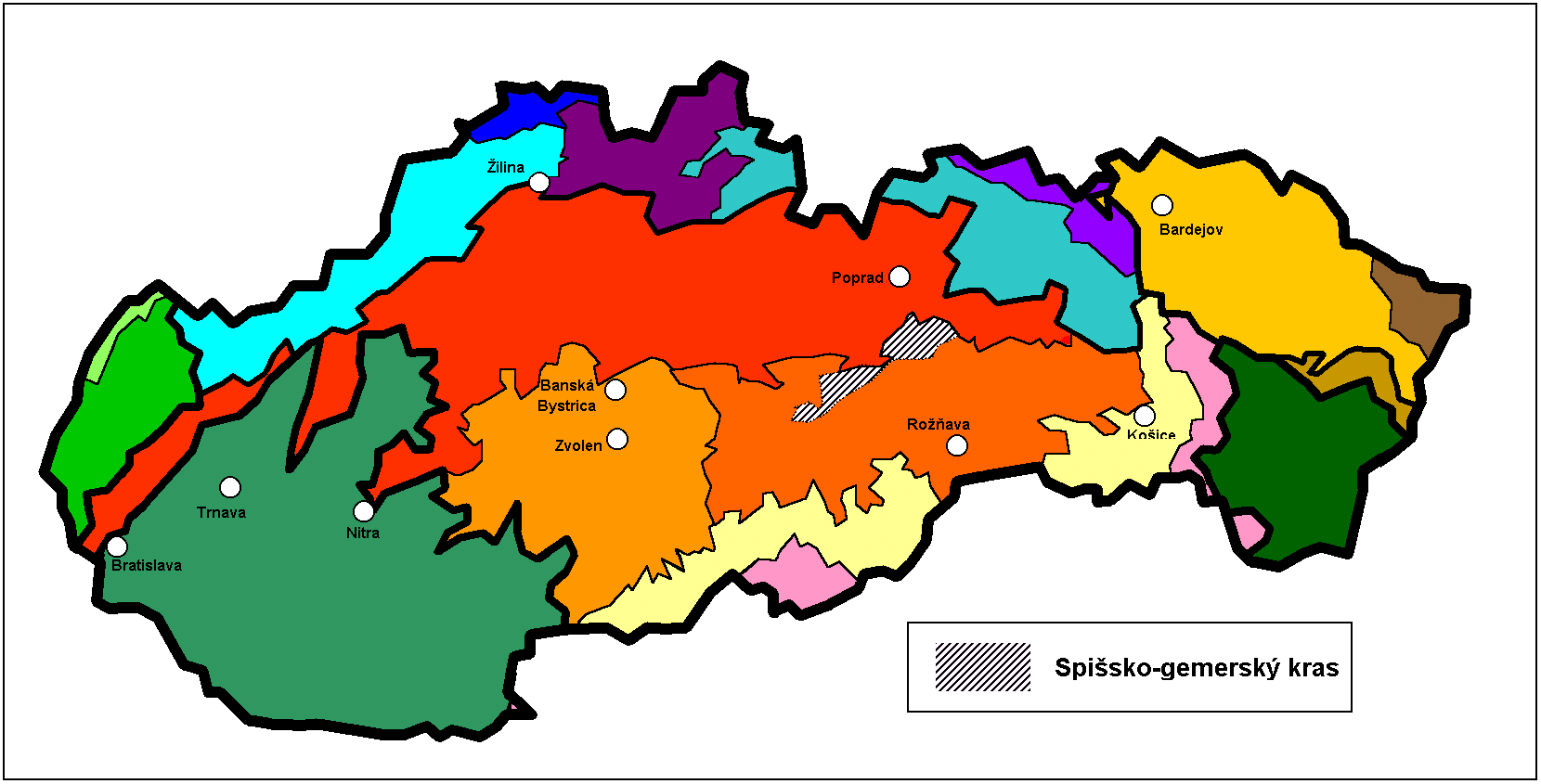 Spissko-gemerský_kras